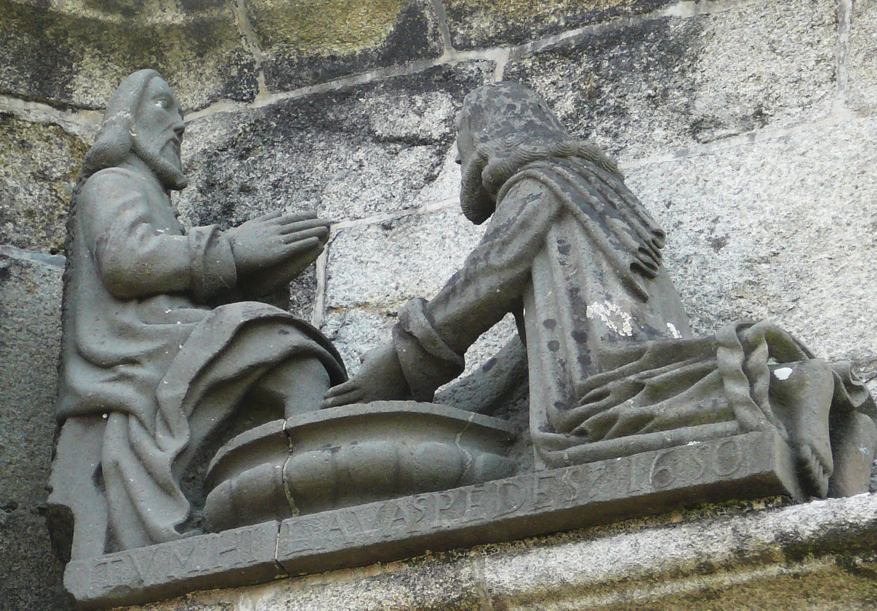 Pleyben : le calvaire, le Lavement des pieds